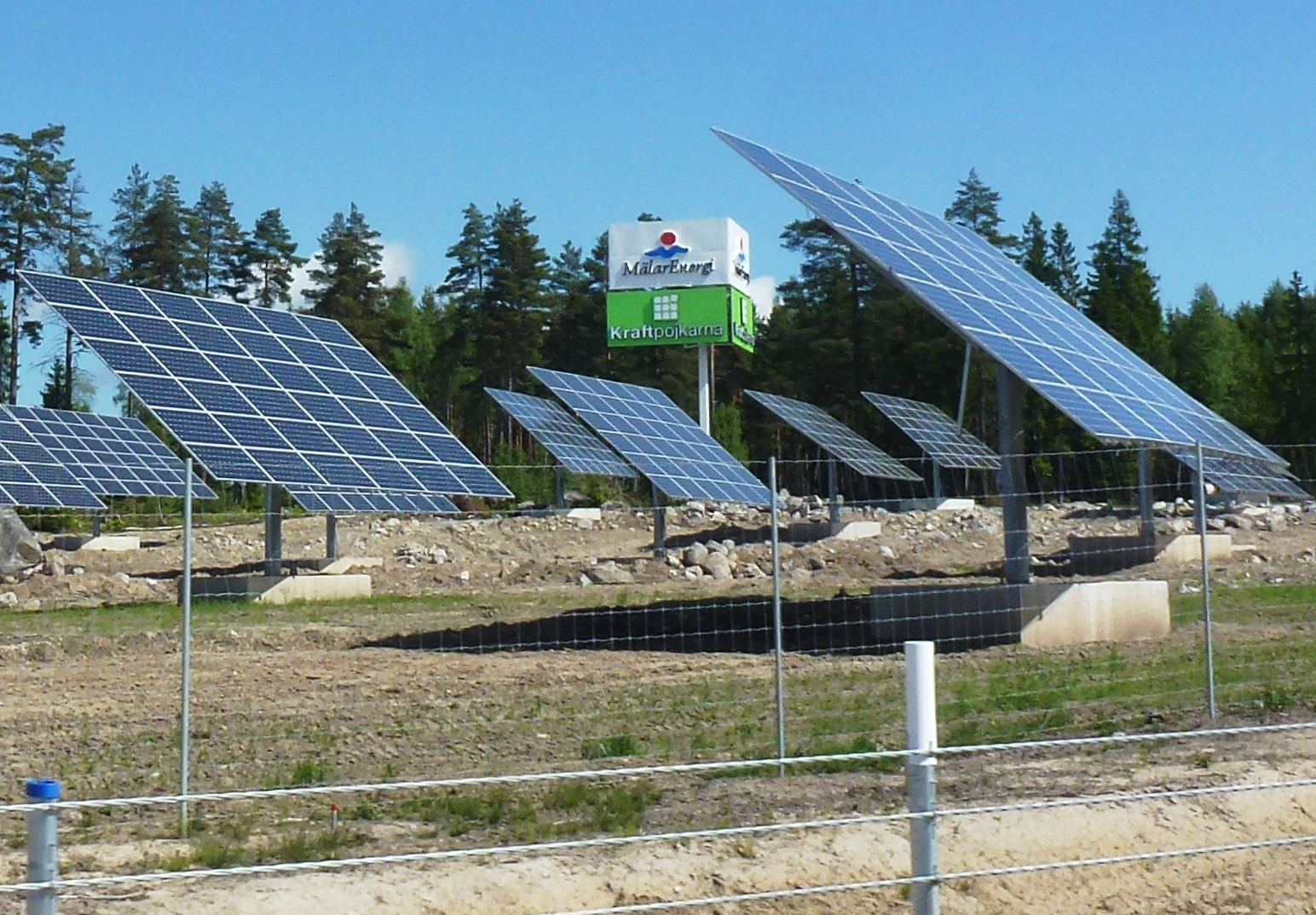 Mälarenergis och Kraftpojkarnas "Solpark"